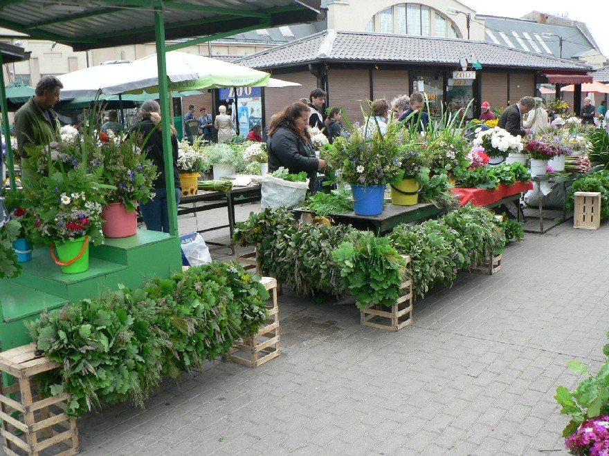 Wieńce i ozdoby na Līgo sprzedawane na rynku w Rydze w przeddzień nocy świętojańskiej.